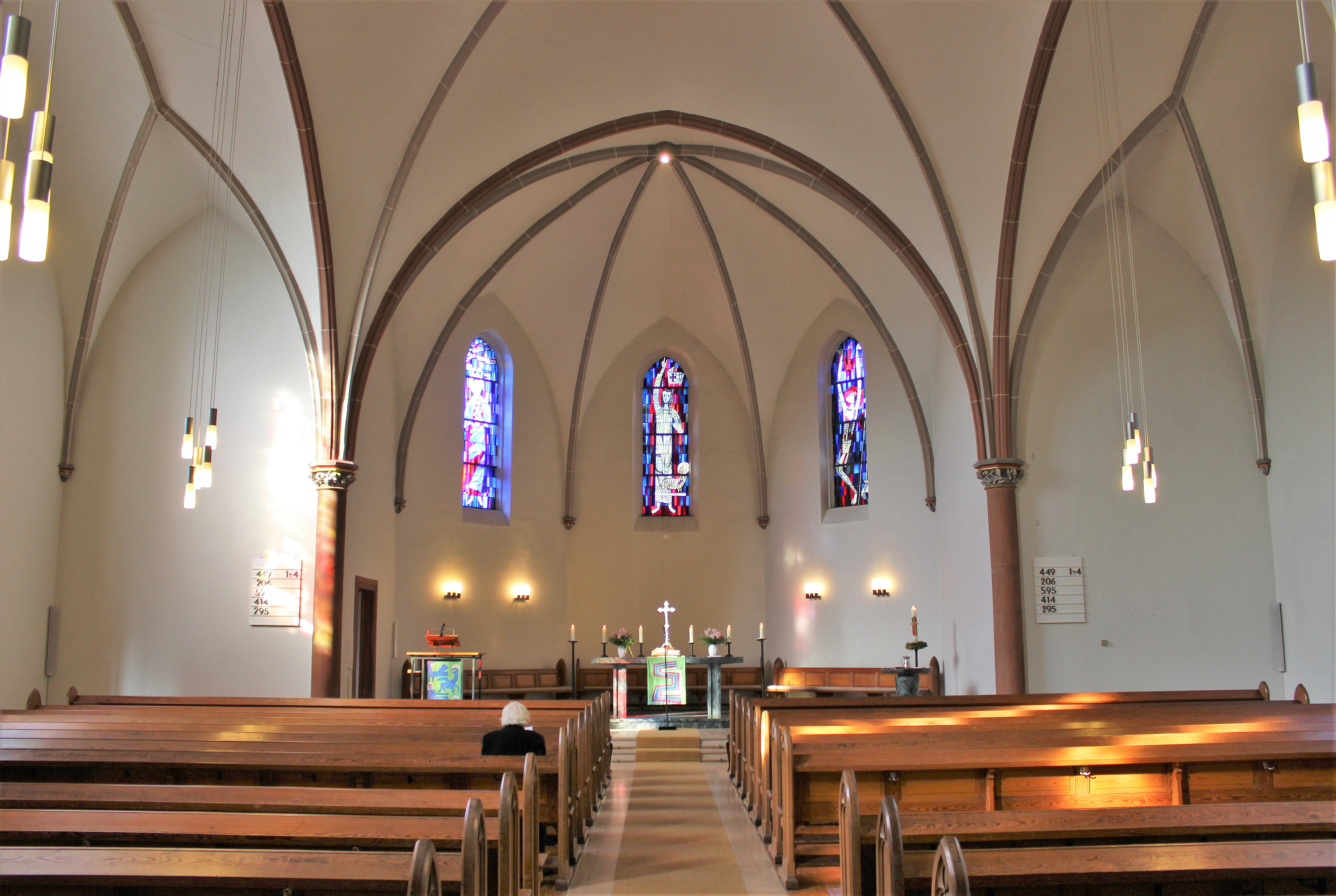 Blick ins Innere der evangelischen Kirche in Riegelsberg, Regionalverband Saarbrücken, Saarland